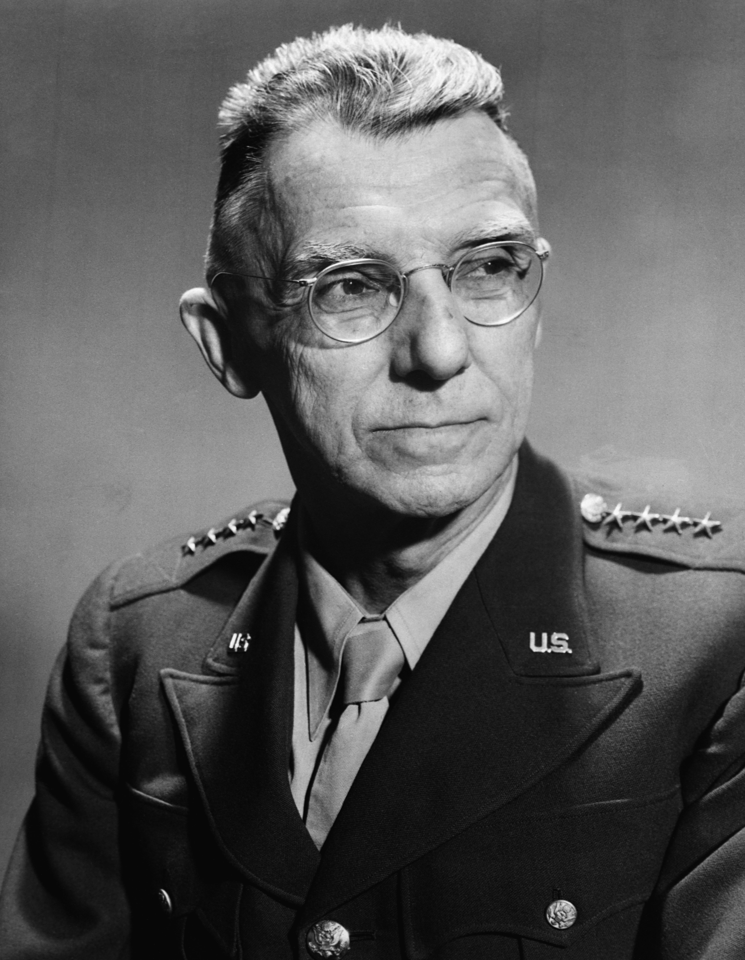 General "Vinegar Joe" Stilwell